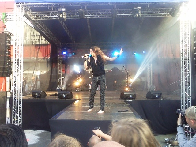 Michał Szpak, uczestnik polskiej wersji "X Factor", podczas koncertu finalistów w Galerii "Port Łódź" w Łodzi, 24 czerwca 2011